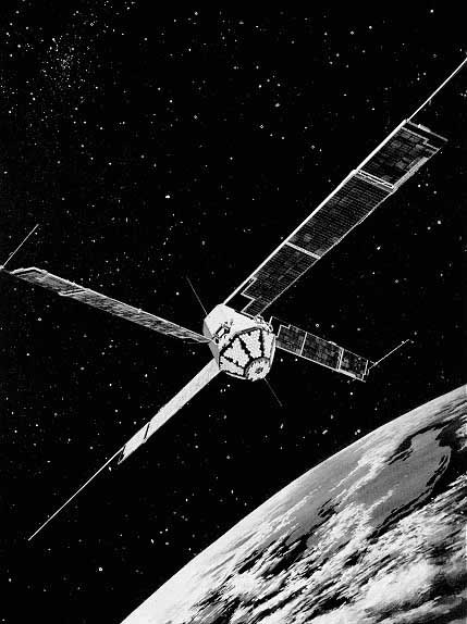 Explorer 27 (BE-C, Beacon Explorer C)